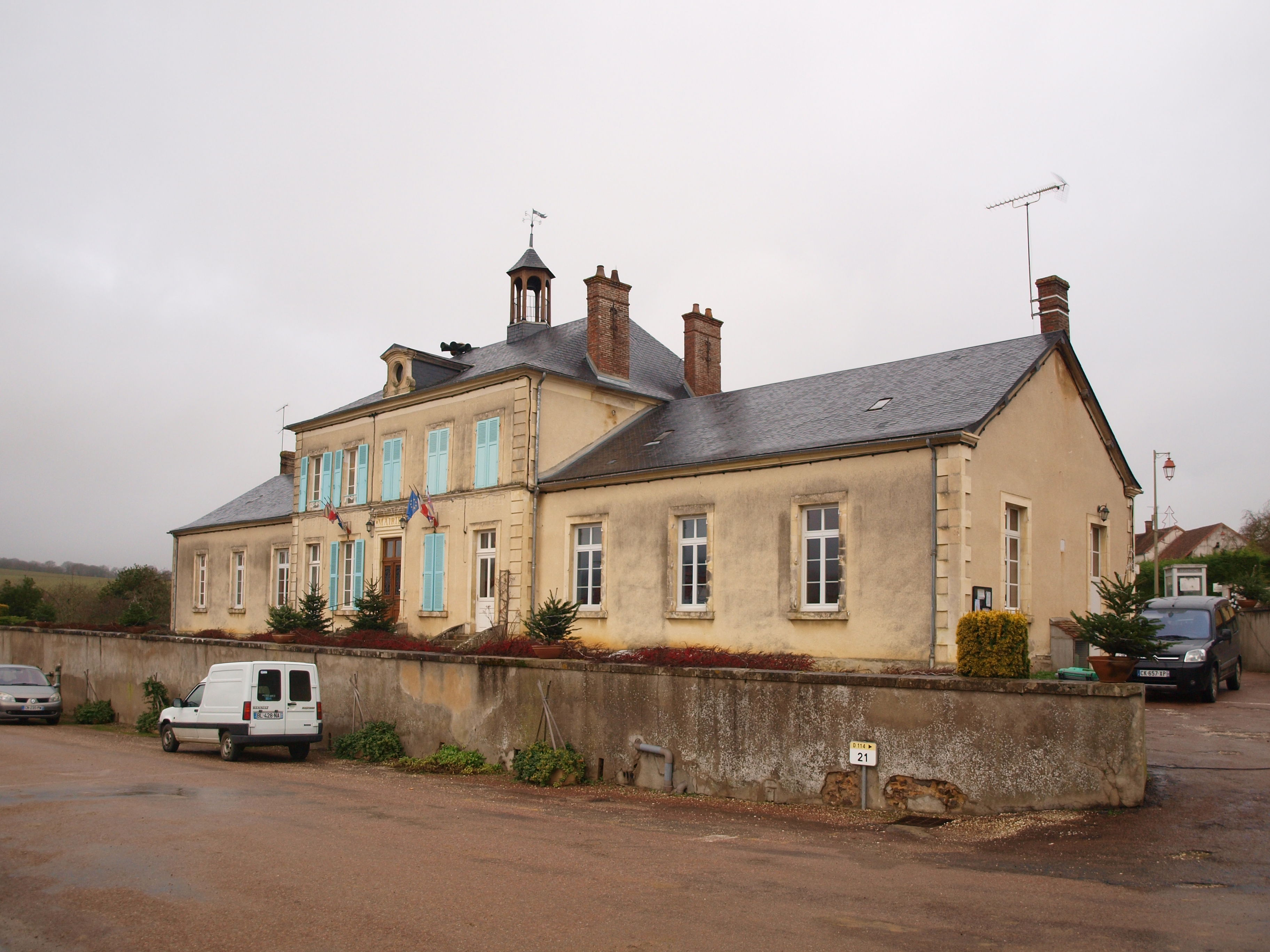 Dampierre-sous-Bouhy (Nièvre, France) - mairie